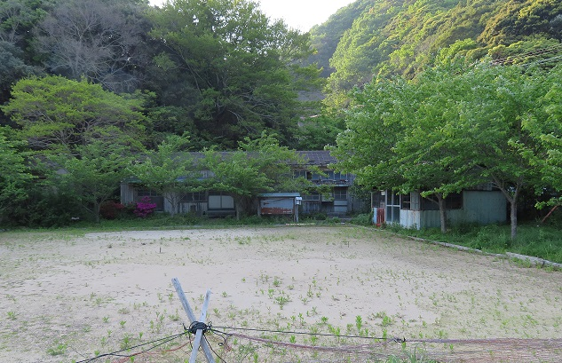 豊玉村立嵯峨小学校跡